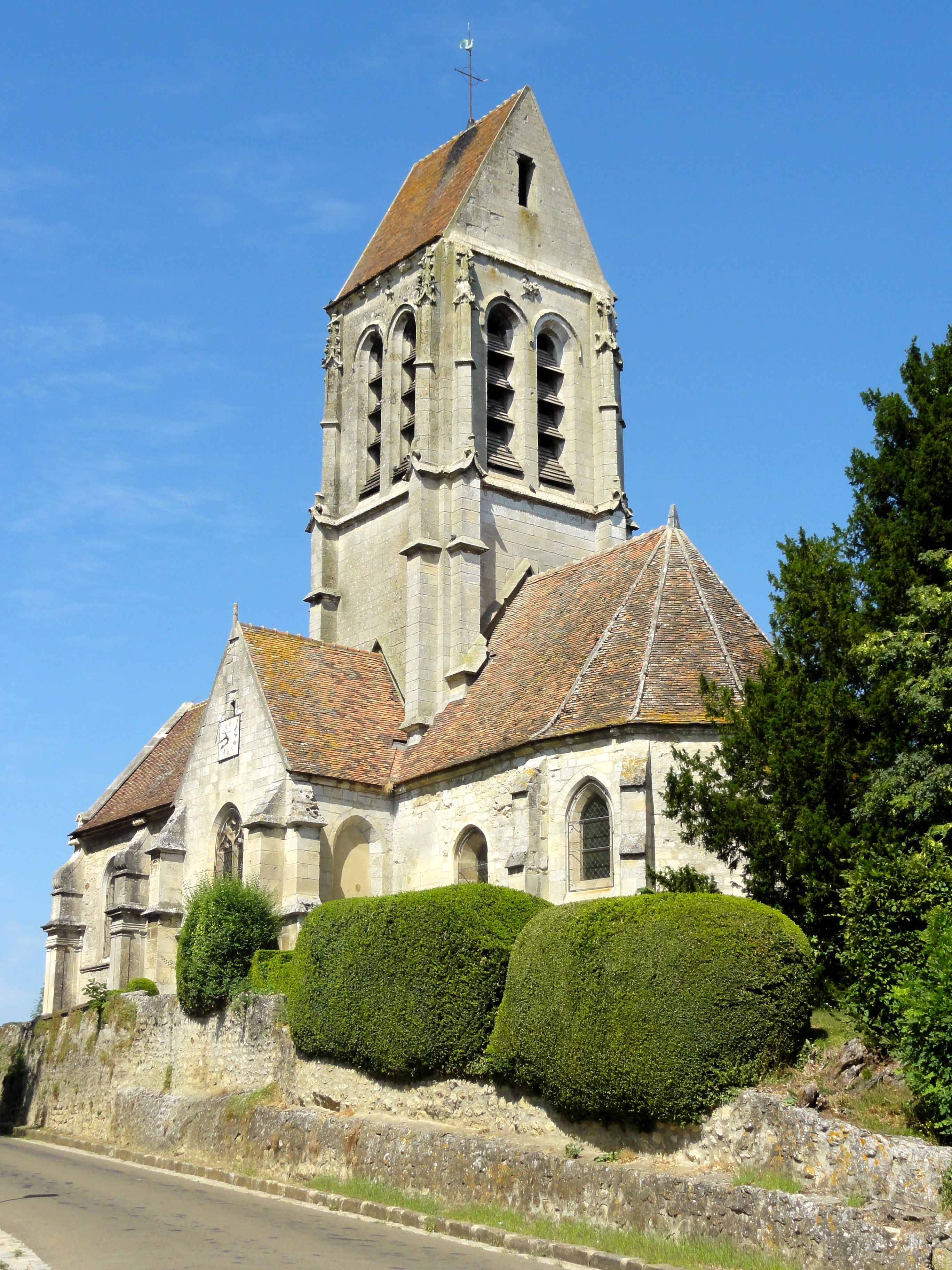 Vue depuis l'est.